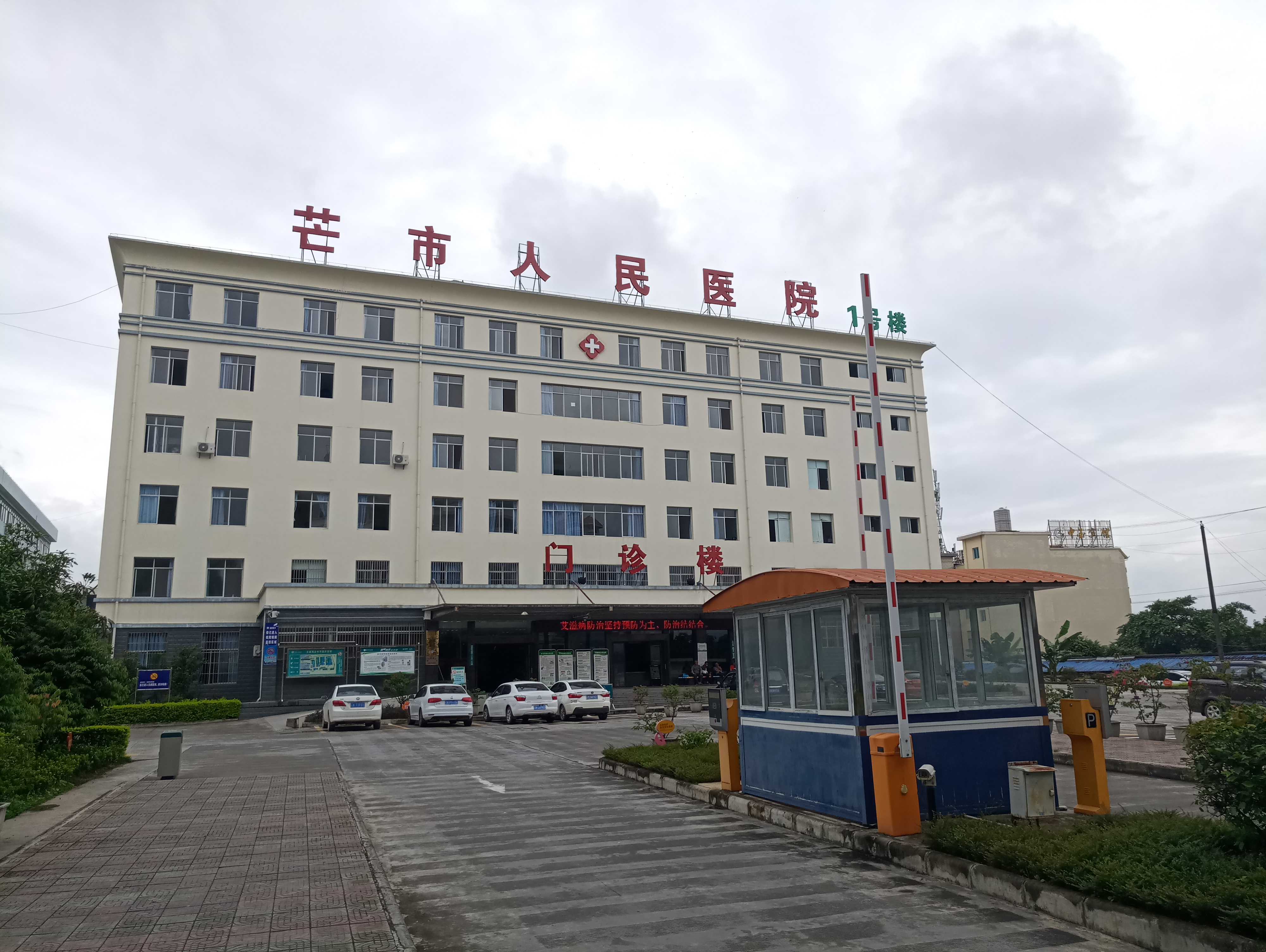 中文（中国大陆）: 芒市人民医院-1号楼